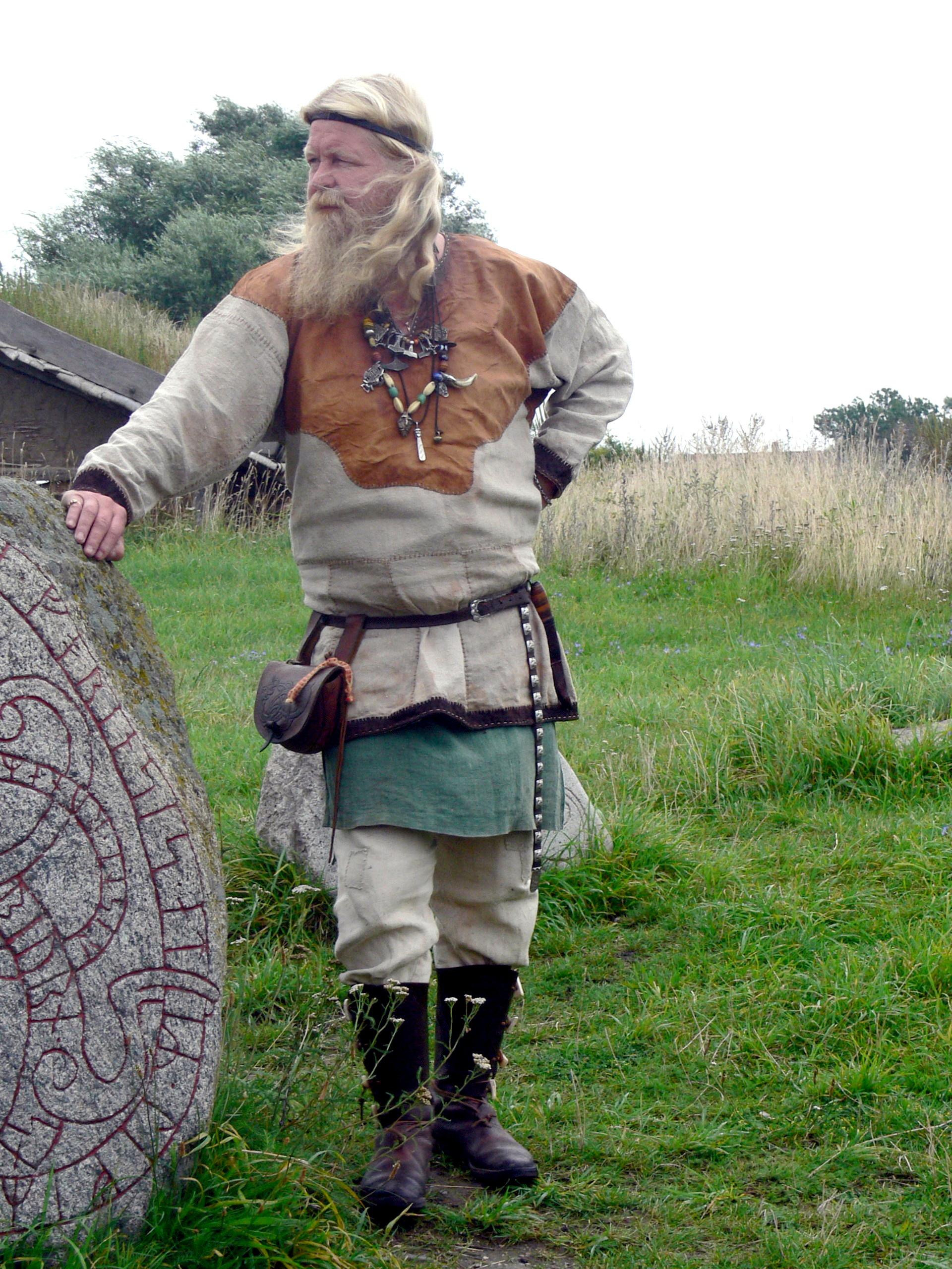 Wikinger Museum Foteviken auf Skanör. Wikinger ( Guide in Wikingerkleidung )